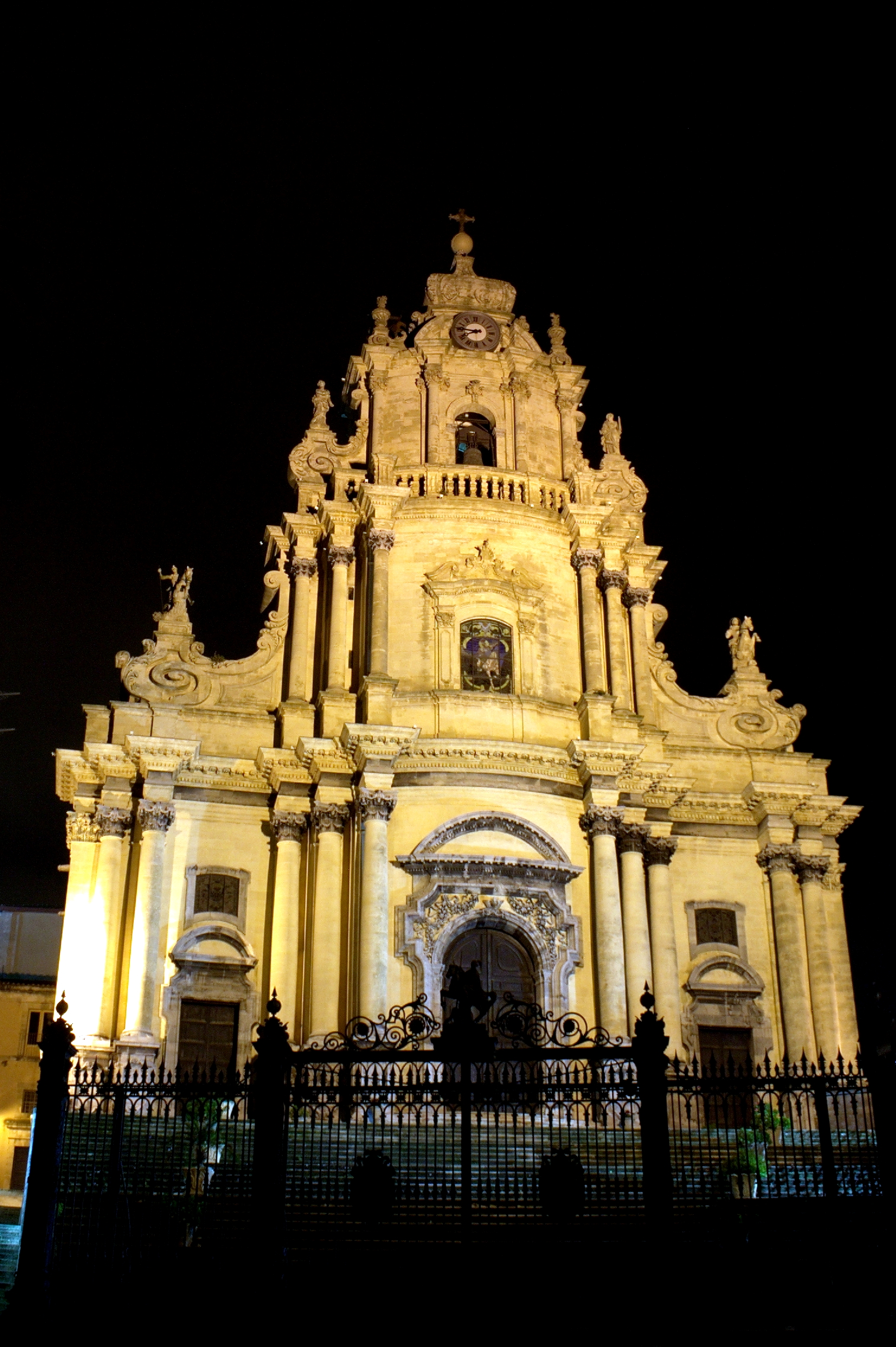 Duomo di San Giorgio (Ragusa, Sicilia.)